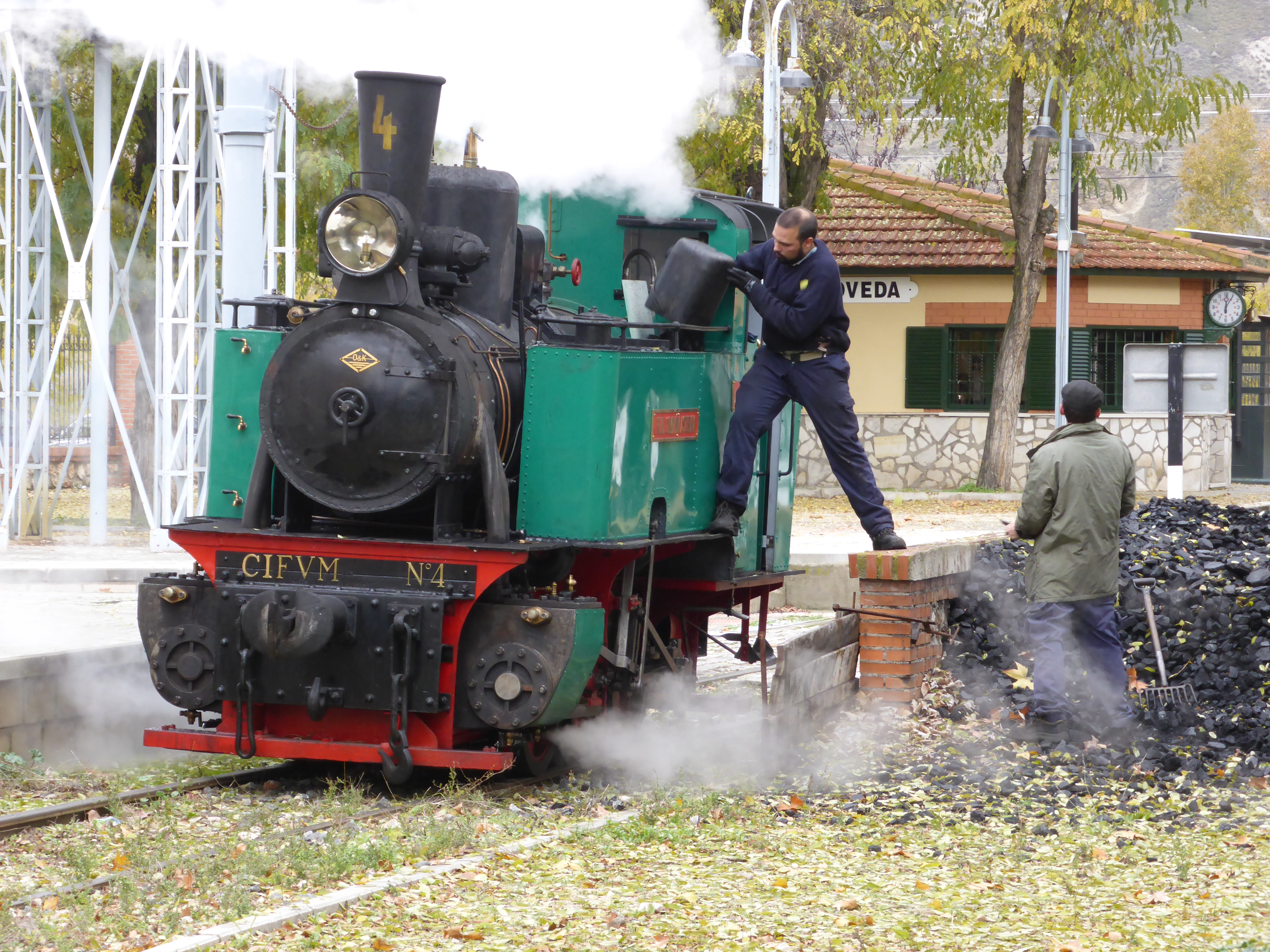 Máquina fabricada por Orenstein & Koppel (O & K) en 1926, en Alemania. Su número de construcción es el 11198. Restaurada por el CIFVM (Centro de Iniciativas Ferroviarias Vapor Madrid), funciona en el Tren de Arganda.